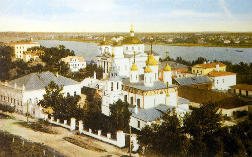 Ярославль. Рядом с Ильинско-Тихоновской располагалась церковь Златоуста в Кремле. Она была выстроена на деньги купца Aбросимова в 1690 году. Это изящное пятикупольное здание также пострадало во время мятежа и впоследствии было полностью разрушено. Конец XIX - начало XX века